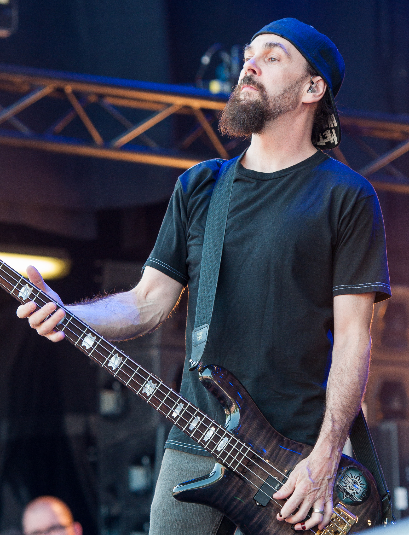 ARGO-Konzerte,Beck's Park Stage,Festival,Godsmack,Konzert,Livekonzert,Livemusik,Musik,RiP,Robbie Merrill,Rock im Park 2015